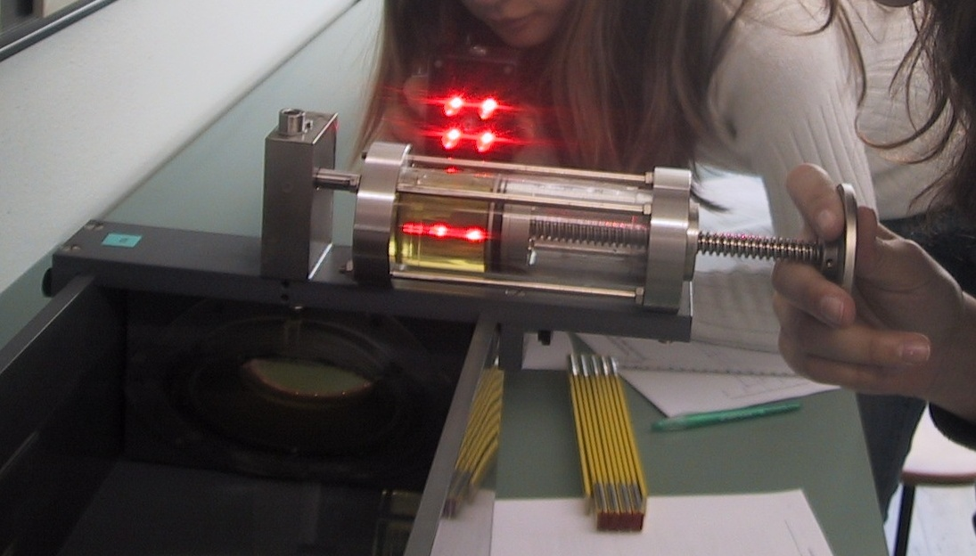 Schüler arbeiten mit einem Realexperiment-Augenmodell